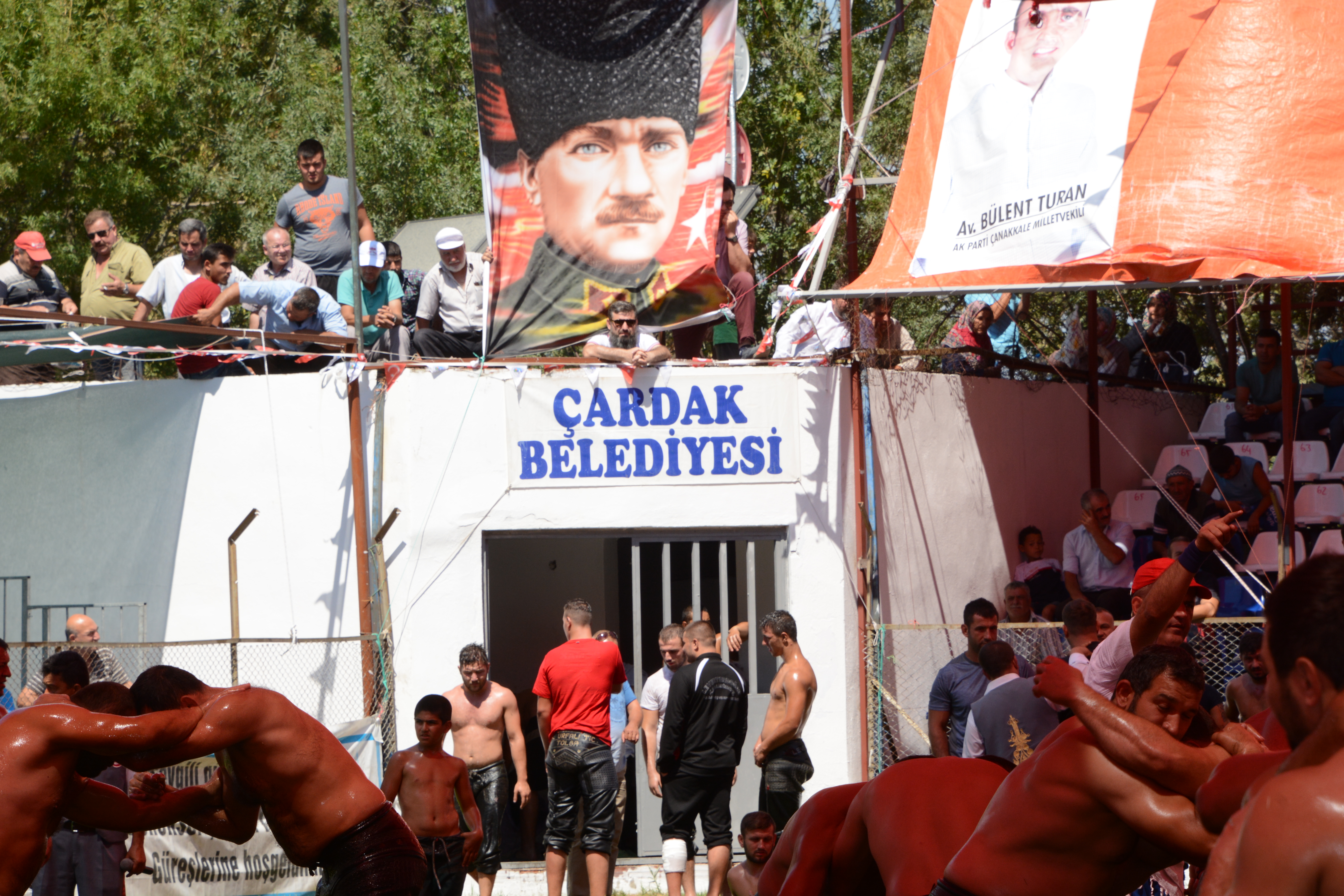 Çardak Yağlı Güreşleri